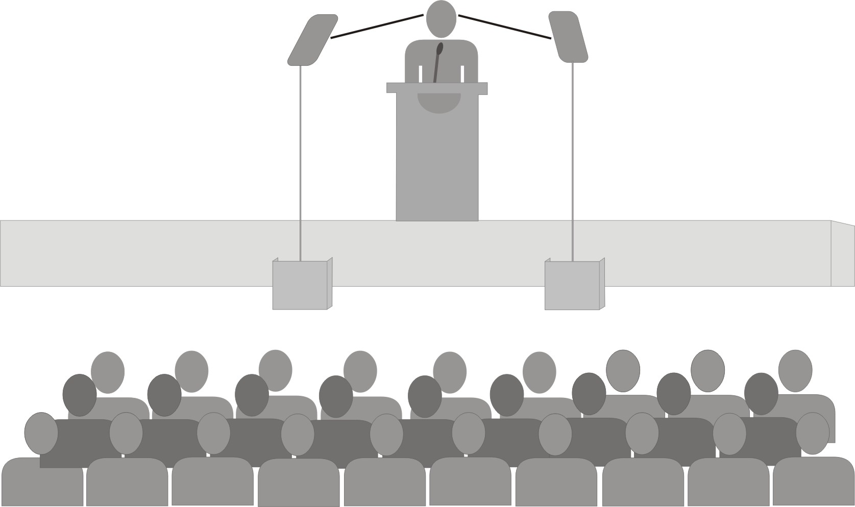 Teleprompter de podium